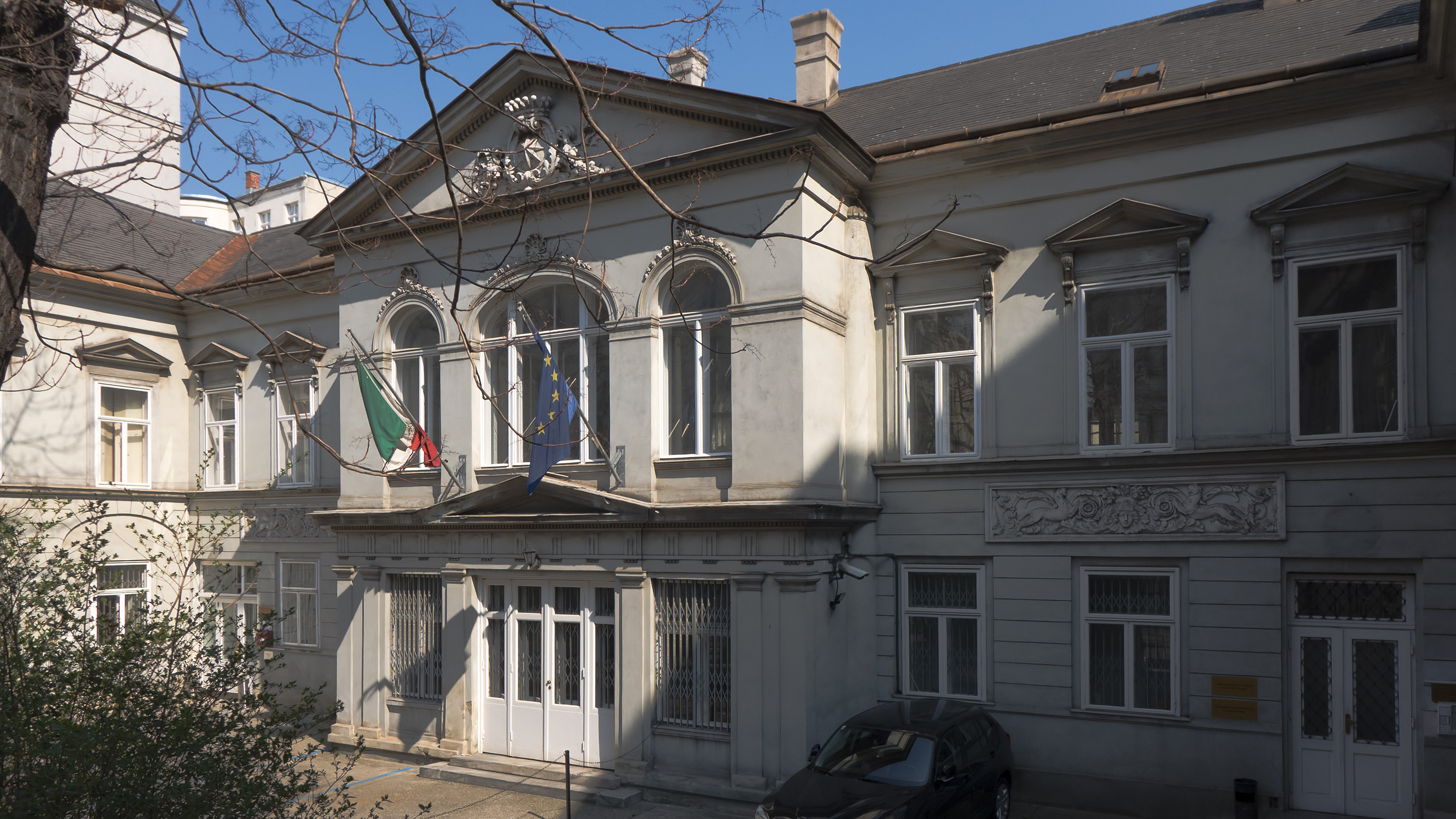 Palais Sternberg in der Ungargasse 43 in Wien 3